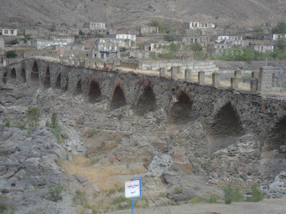 Xudafərin körpüsü 1027-ci ildə Şəddadi hökmdarı Məhəmməd oğlu Fəzl (Fəzl ibn Məhəmməd) tərəfindən inşa olunub. Unikal memarlıq abidəsi olan körpüdə Azərbaycan memarlıq məktəbinin üslubu izlənilməkdədir. Ağa Məhəmməd şah Qacarın Azərbaycana yürüşü zamanı bir hissəsi uçurulsa da, sonradan bərpa edilmişdir. Təbii qayalar üzərində inşa edilən körpünün bir hissəsi dövrümüzə qədər gəlib çatıb. Körpüdən bir qədər aralı daha bir körpü də vardır ki, bu körpü də Xudafərin adlanır. İkinci körpü 11 gözdən ibarət olmuş və XIII əsrdə, Elxanilər dövründə inşa edilmişdir. Hazırda həmin körpünün yalnız 3 aşırımı salamatdır. Hər iki körpü İpək yolunun üzərində yerləşir.